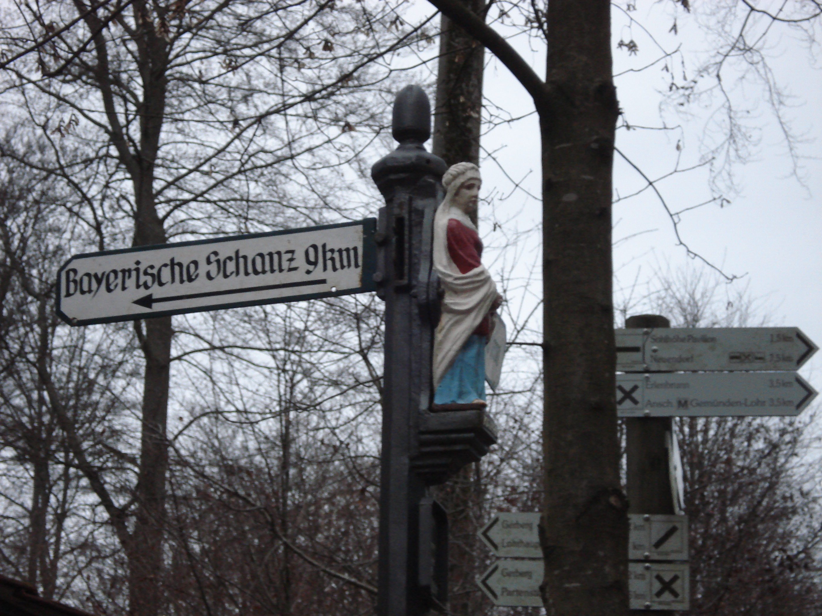 Katharinenbild